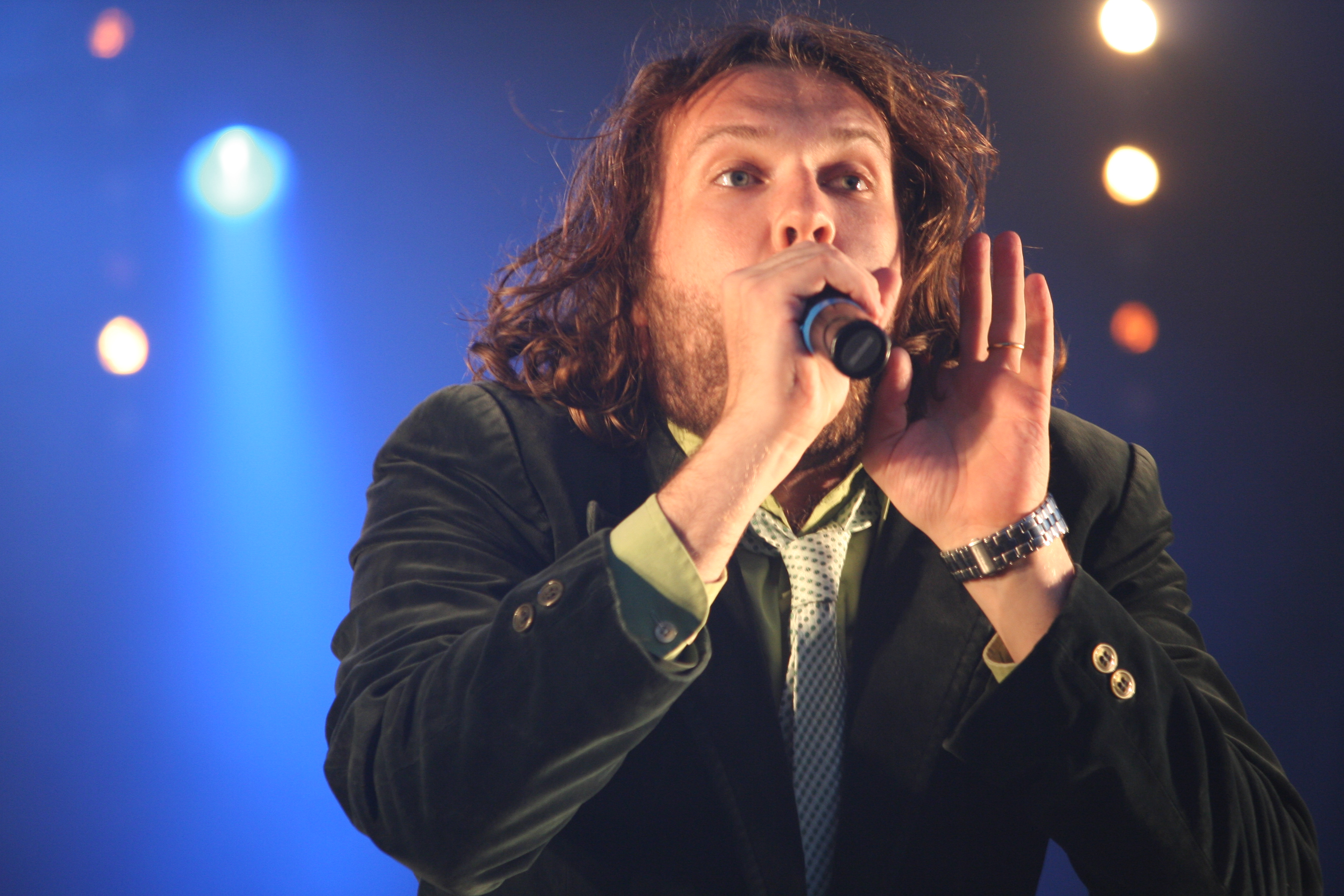 Fête de la Musique à Saint-Lô - France : La Chanson du Dimanche